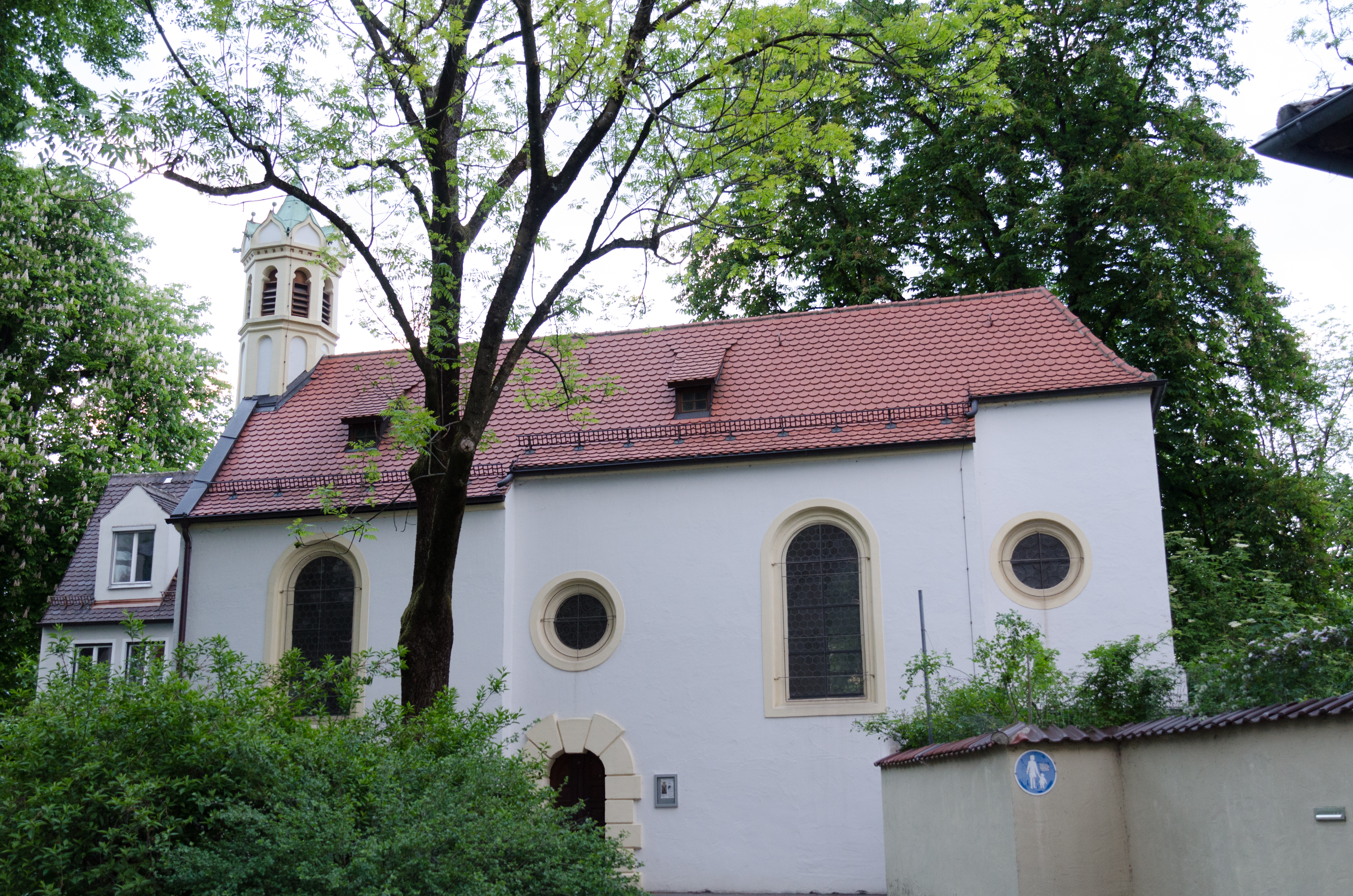 Augsburg, St. Gallus